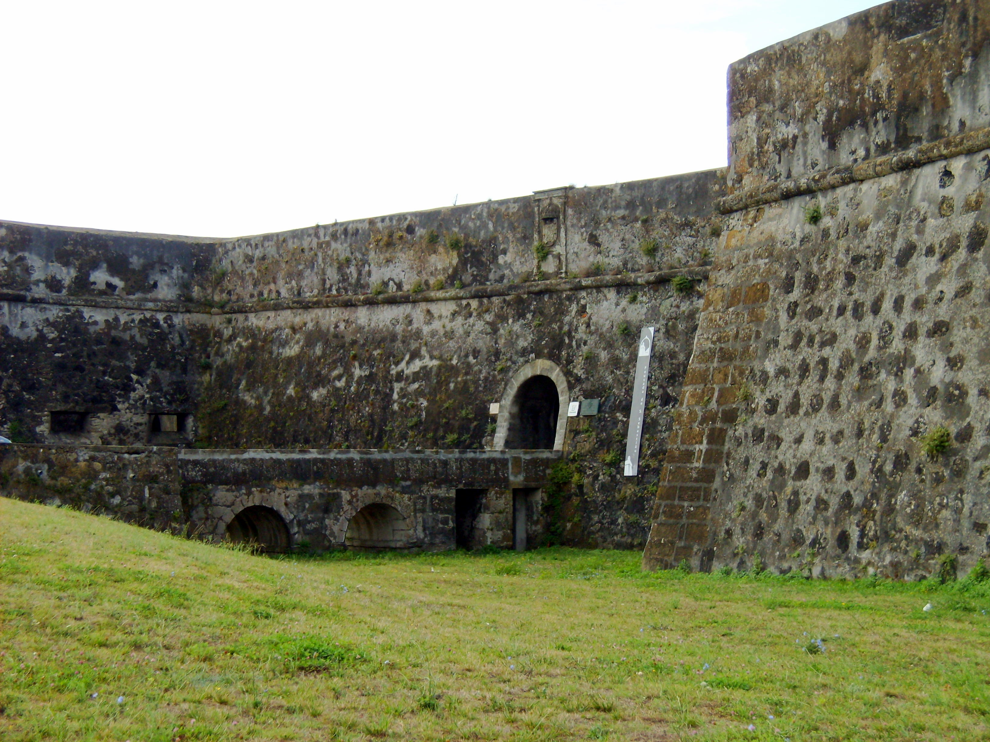 Forte de São Sebastião, freguesia de Nossa Senhora da Conceição, cidade e concelho de Angra do Heroísmo, ilha Terceira, Açores: panorâmica do Portão de Armas.